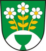 Opatov